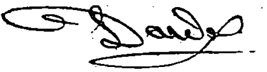 Signature de l'architecte René Dardel.